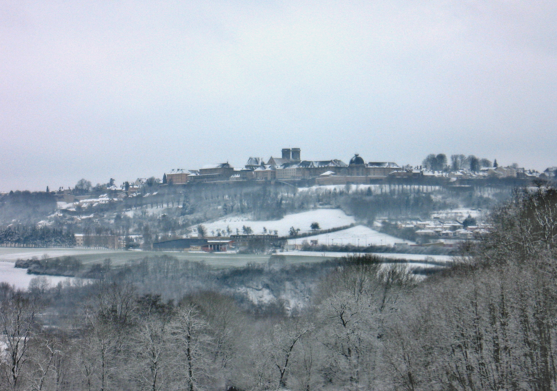 Langres